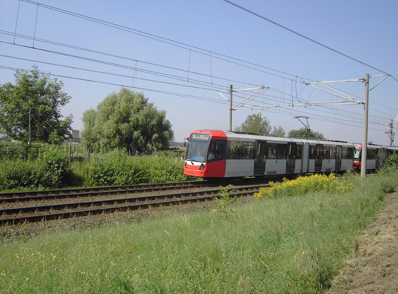 Bombardier Flexity Swift K5000 light rail vehicle, operated by SWB Bus und Bahn (Stadtwerke Bonn), near Hersel